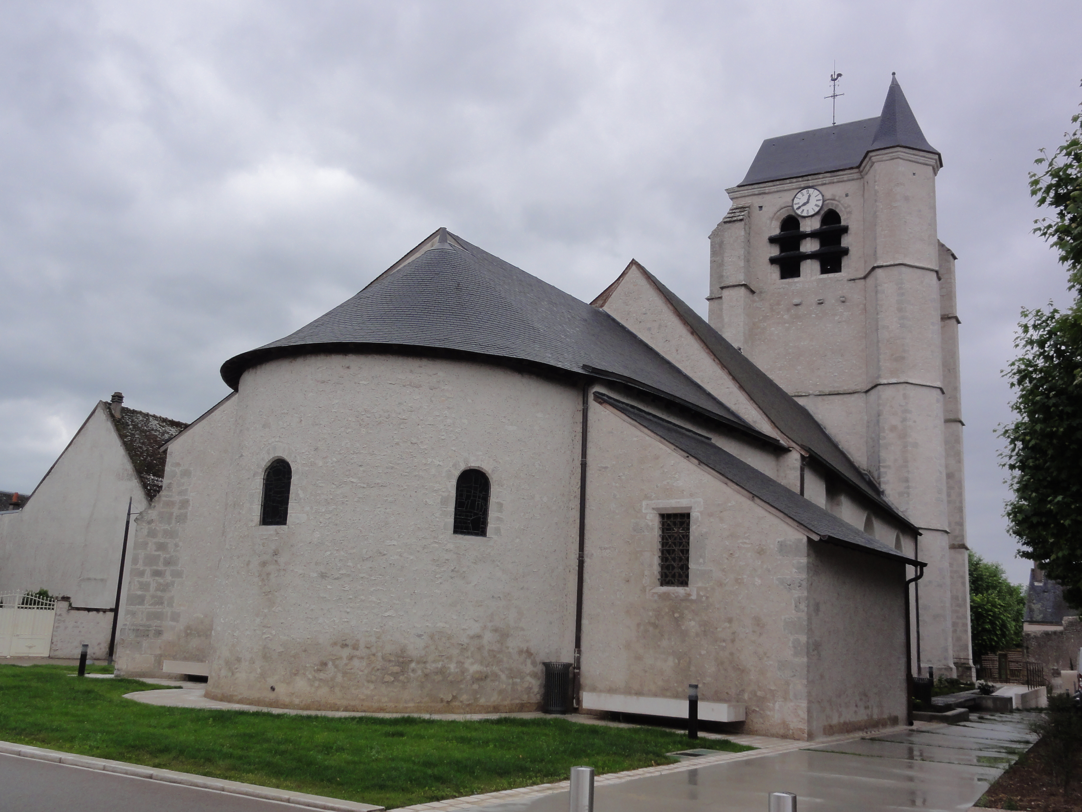 Église Saint-Pierre de Montlivault